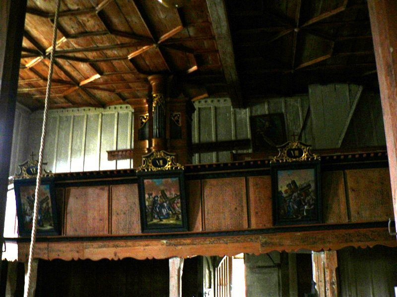 Kostel sv. Michala v MAršíkově, kůr a varhany